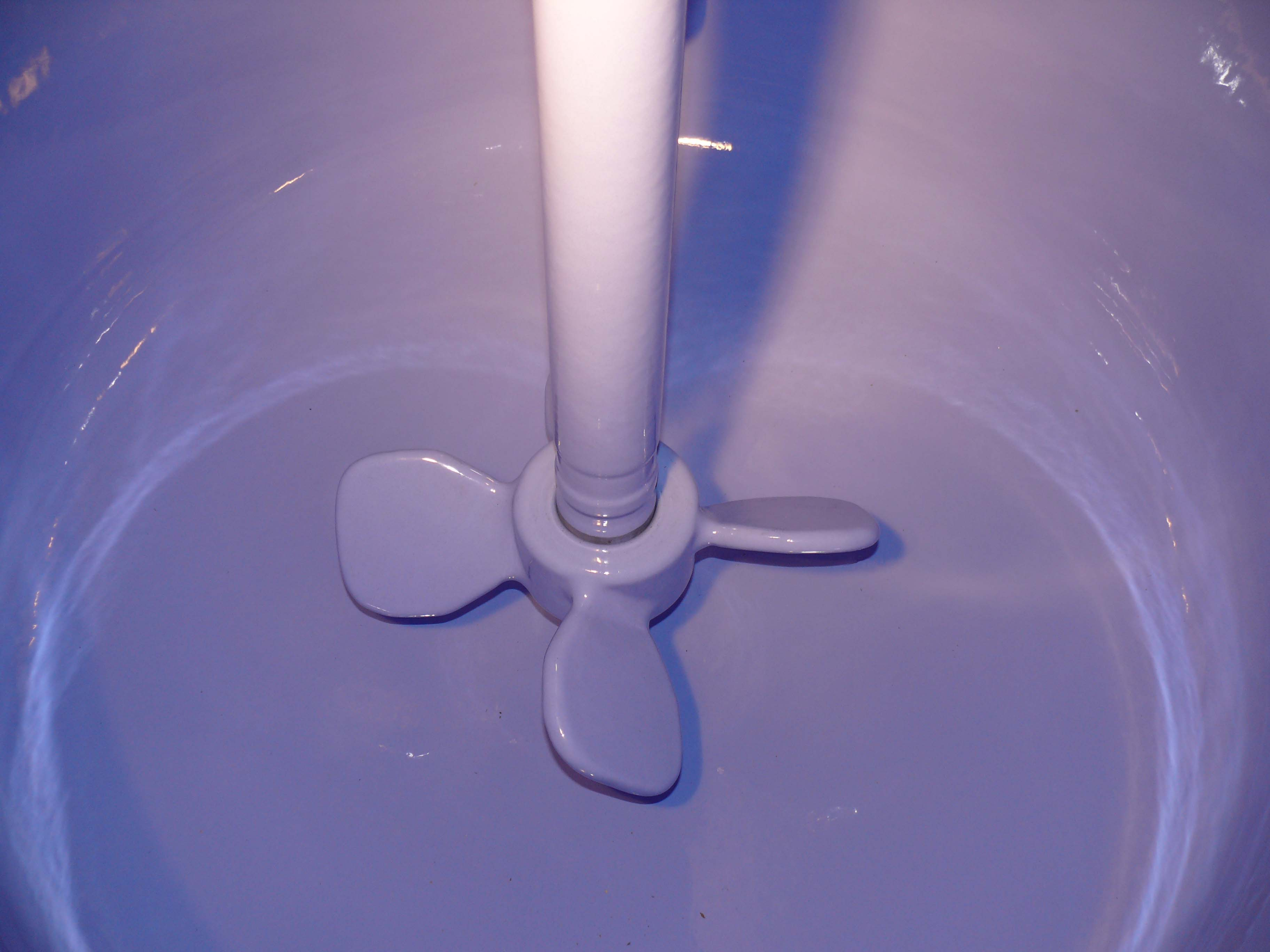 Turborührer